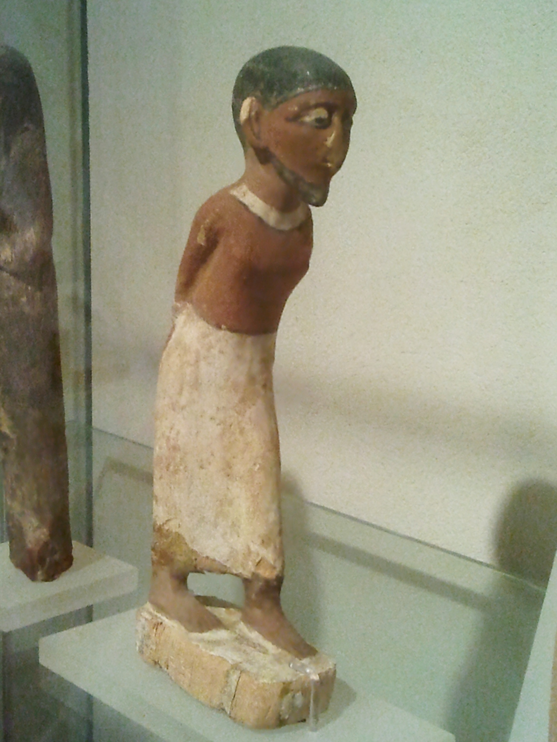 צלמית של שבוי שמי, ידיו קשורות מאחור, ממצרים העתיקה. אסף מוזיאון הכט